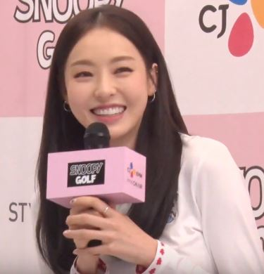 배우 이다희가 28일 오후 서울 영등포구 신도림동 현대백화점 디큐브시티점에서 열린 골프웨어 브랜드 '스누피 골프(SNOOPY GOLF)' 팬사인회에 참석해 포토타임을 가졌다.